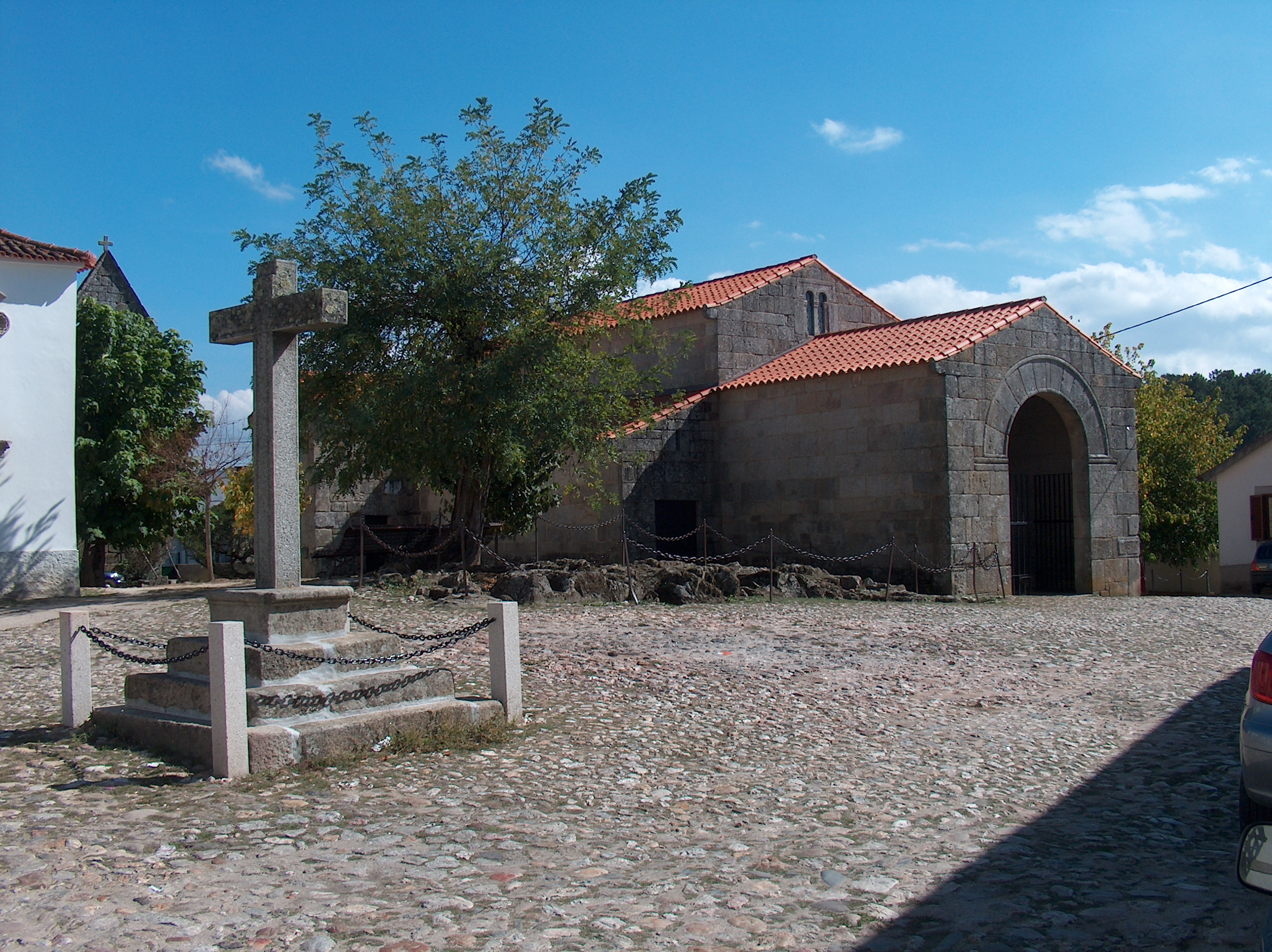 Igreja de São Pedro de Lourosa ou Igreja Matriz de Lourosa This file was uploaded for Wiki Loves Monuments in Portugal with the unique identifier 70268.